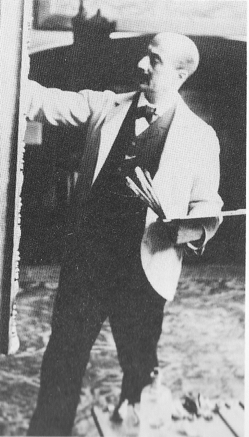 Max Liebermann an der Staffelei in seinem Atelier